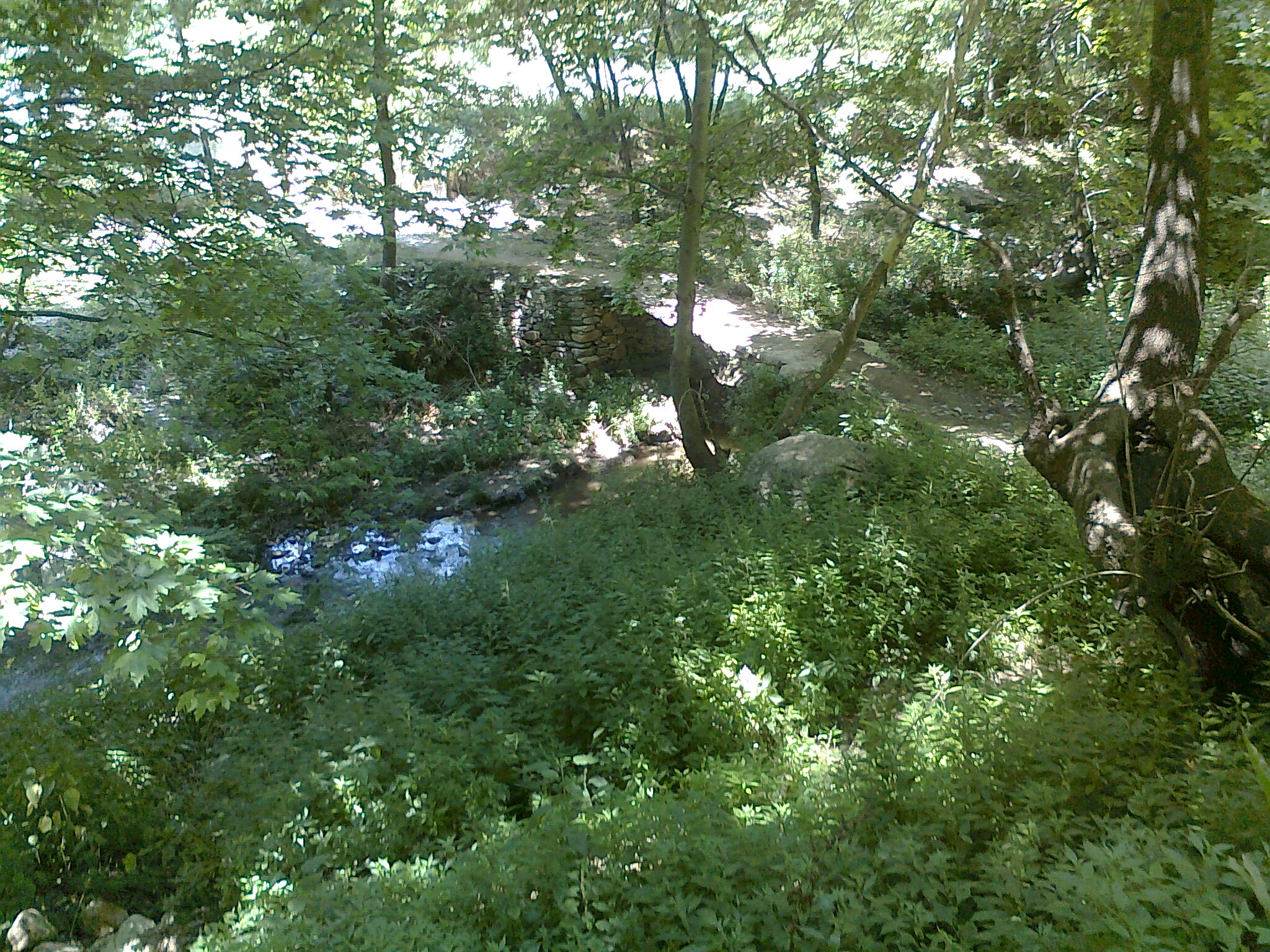 Anska River in Bašibos